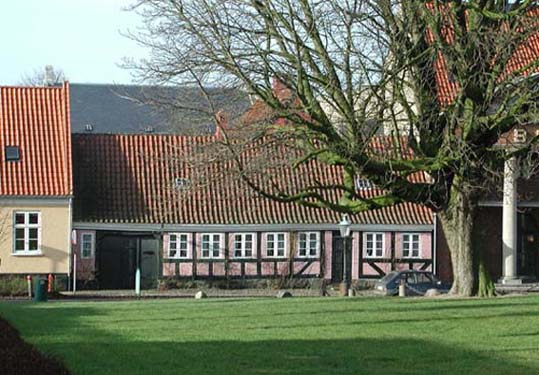 Anthon Jensens gamle kulturhistoriske museum, Damgade 26, Assens